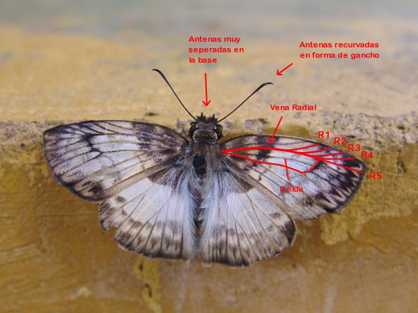 Mylon menippus, Foz do Iguaçu (Brasil), 18/01/2007